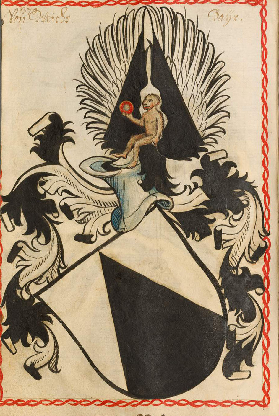 Scheibler'sches Wappenbuch, älterer Teil; , Seite 370 Von Weichs Bayern